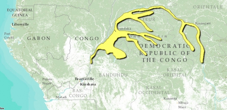 Mappa Ecoregione AT0110 - Foreste palustri del bacino orientale del Congo